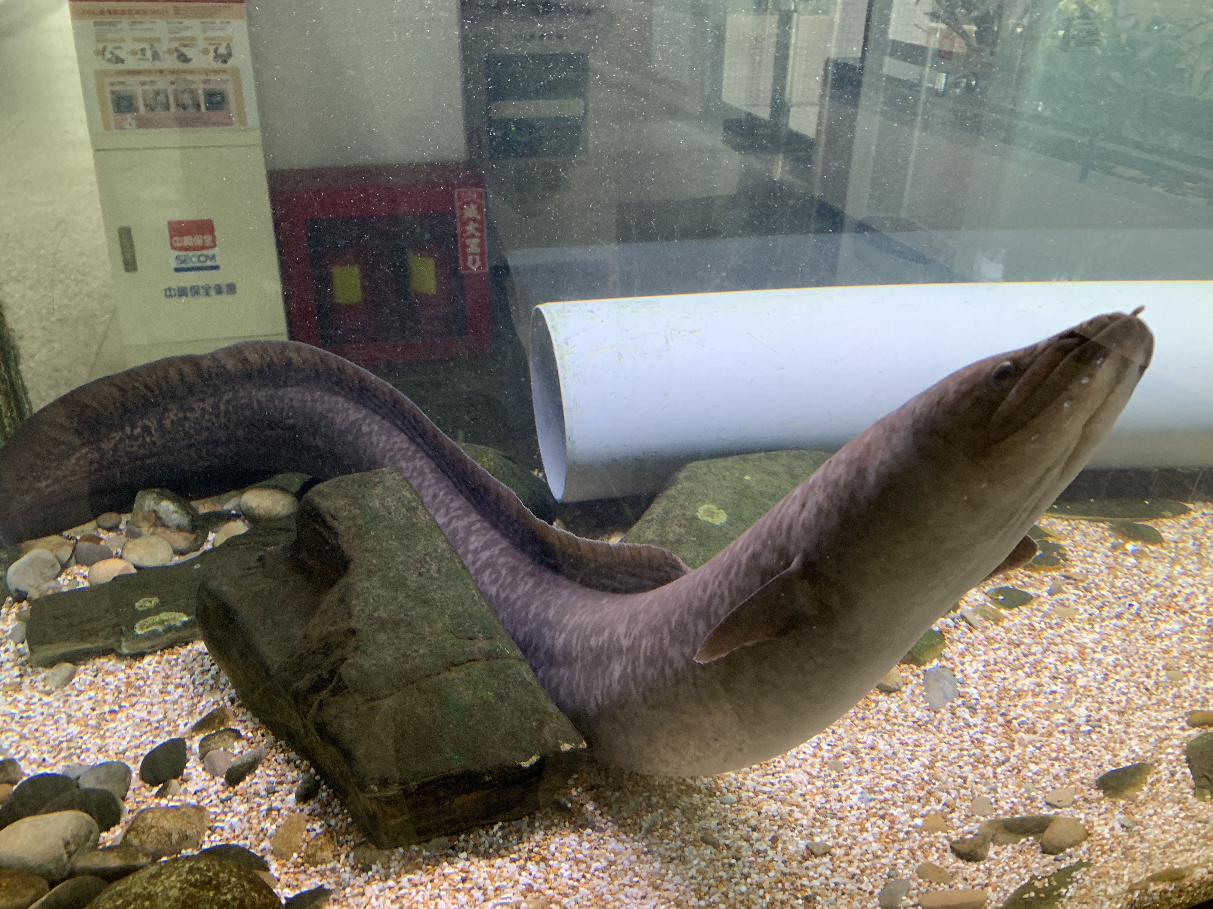 由國立清華大學生命科學學院師生人工飼養的臺灣鱸鰻（在幼年時被撈捕自臺灣深山溪流）。